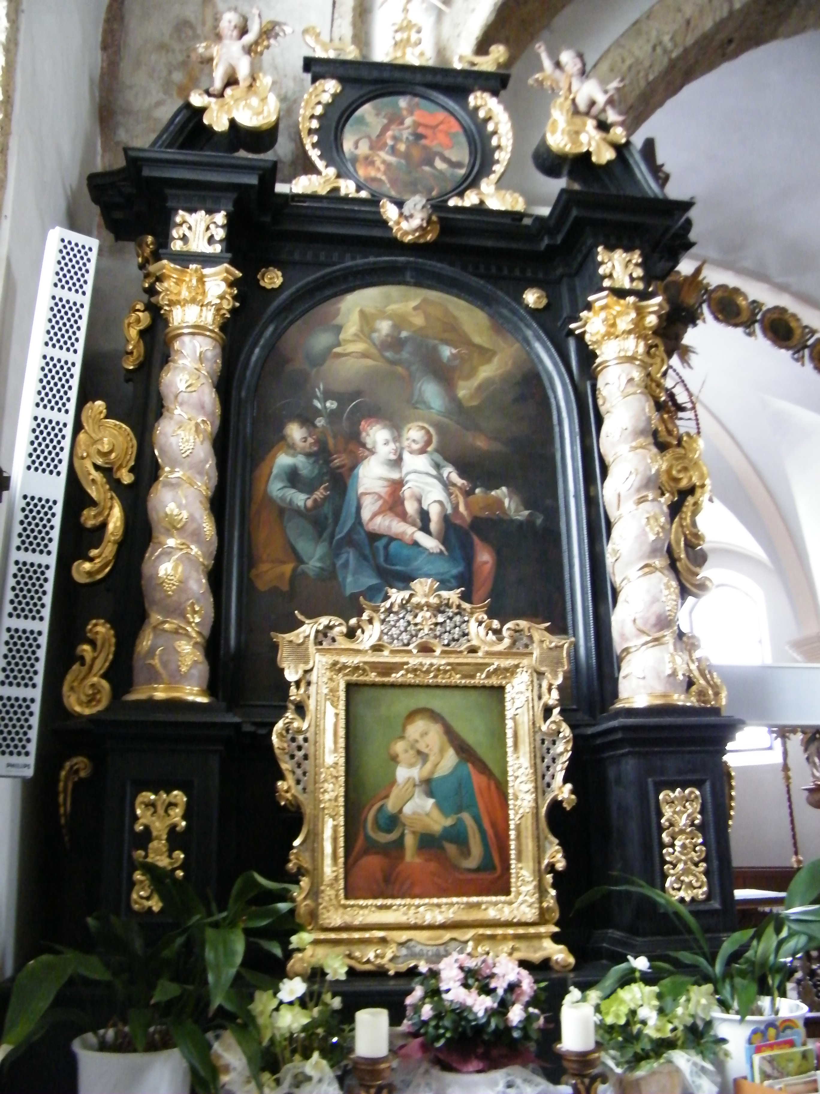 1687 Altar Wolf Reitlechner, Bilder Matthias Wichlhamer Faistenau: hl. Familie und hl. Georg. Vorsatzbild Mariahilf, Rahmen ca. 1730/40